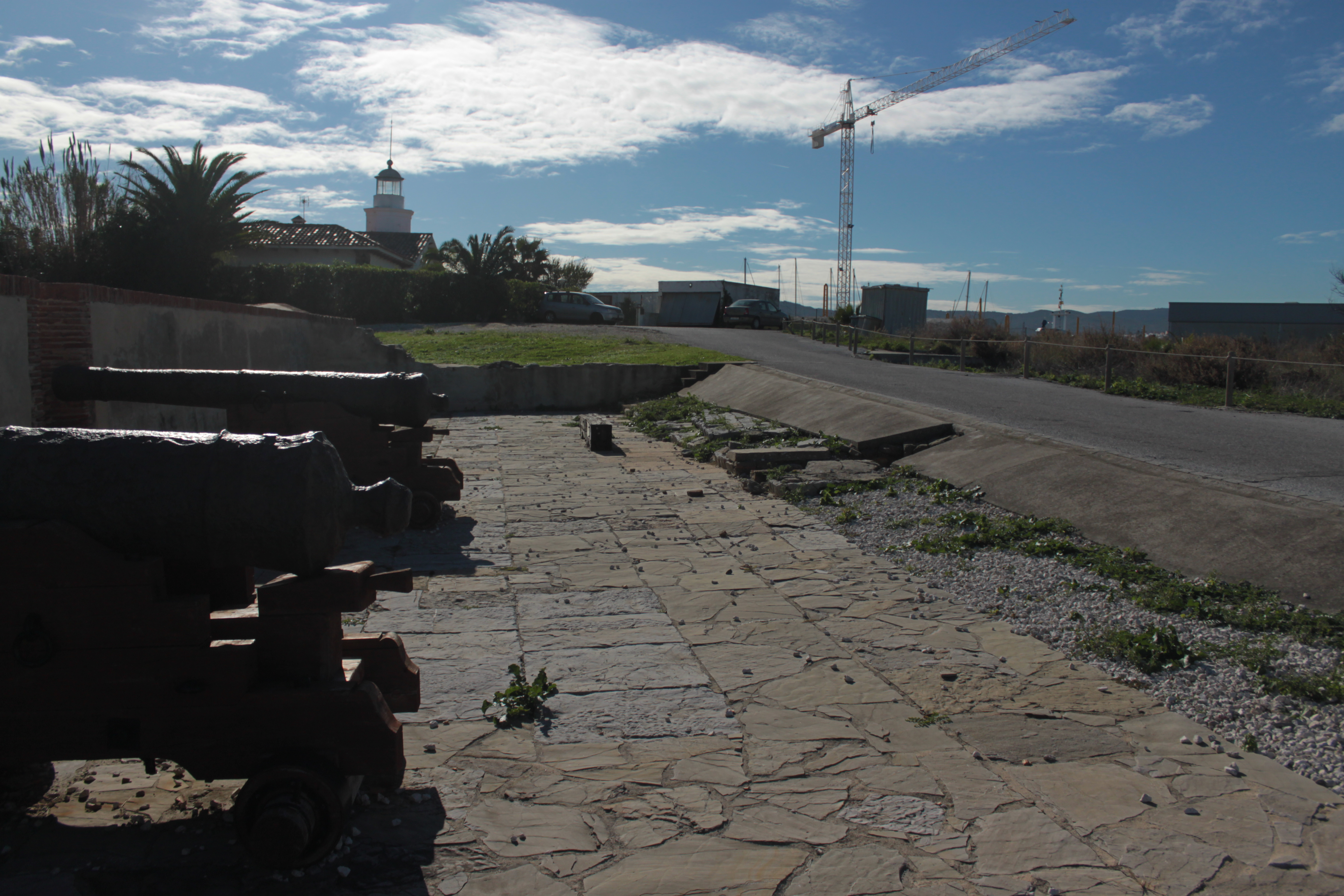 Restos del Fuerte de Isla Verde, en el interior de las instalaciones del Puerto de Algeciras. Algeciras, Andalucía, España.